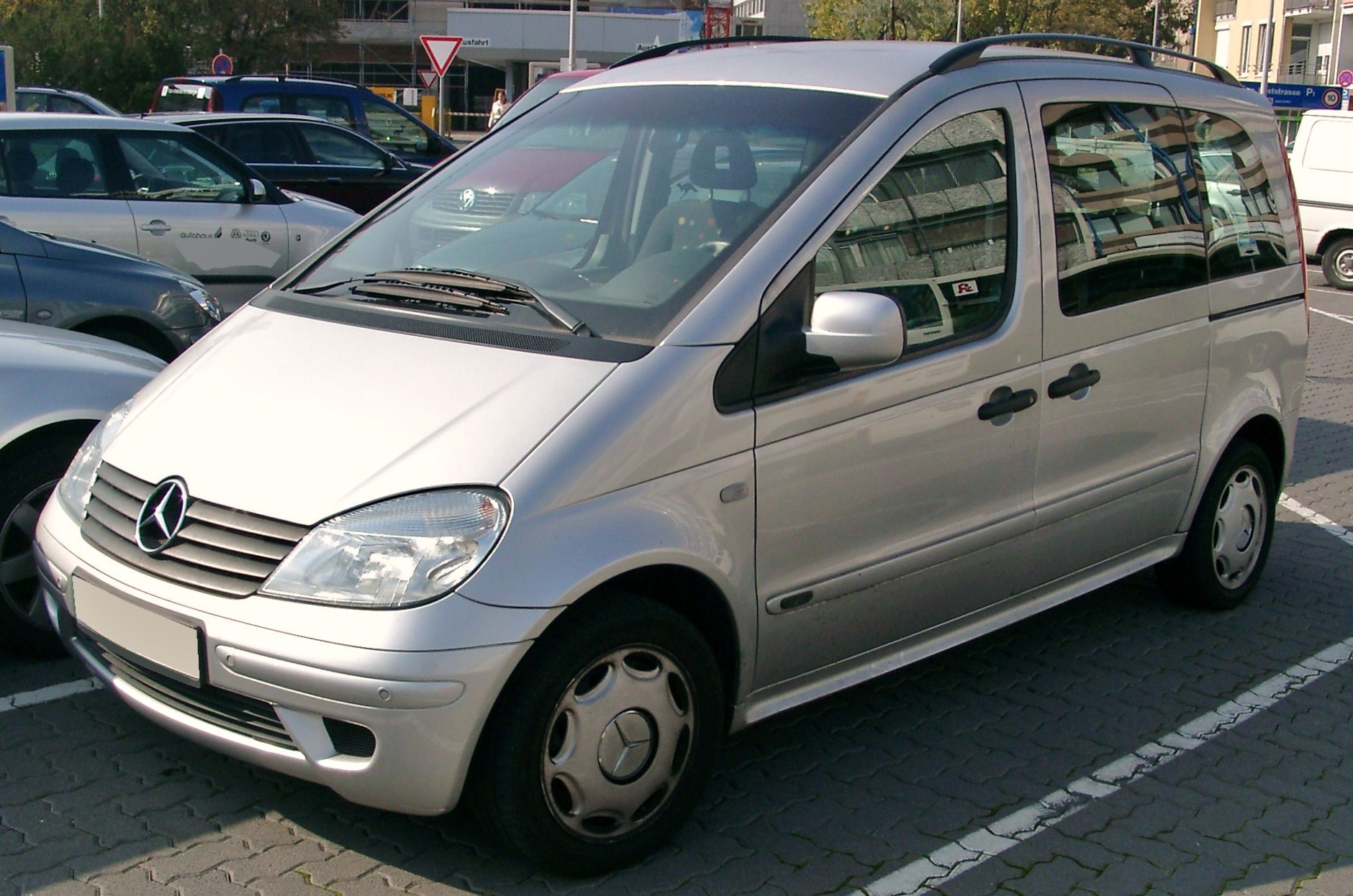 Mercedes-Benz Vaneo